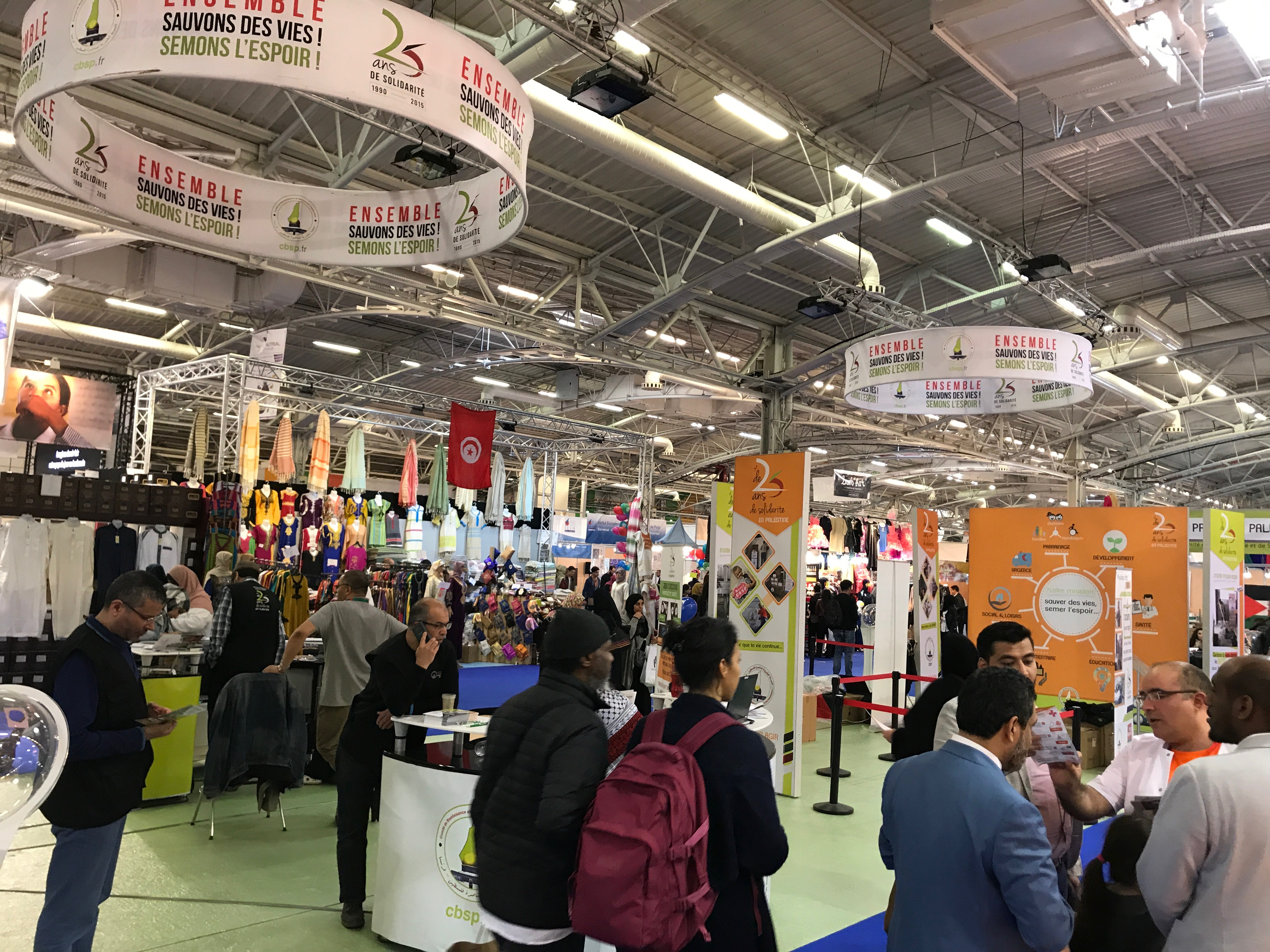 Stand CBSP, Rencontre annuelle des musulmans de France, avril 2017, Paris Le Bourget.